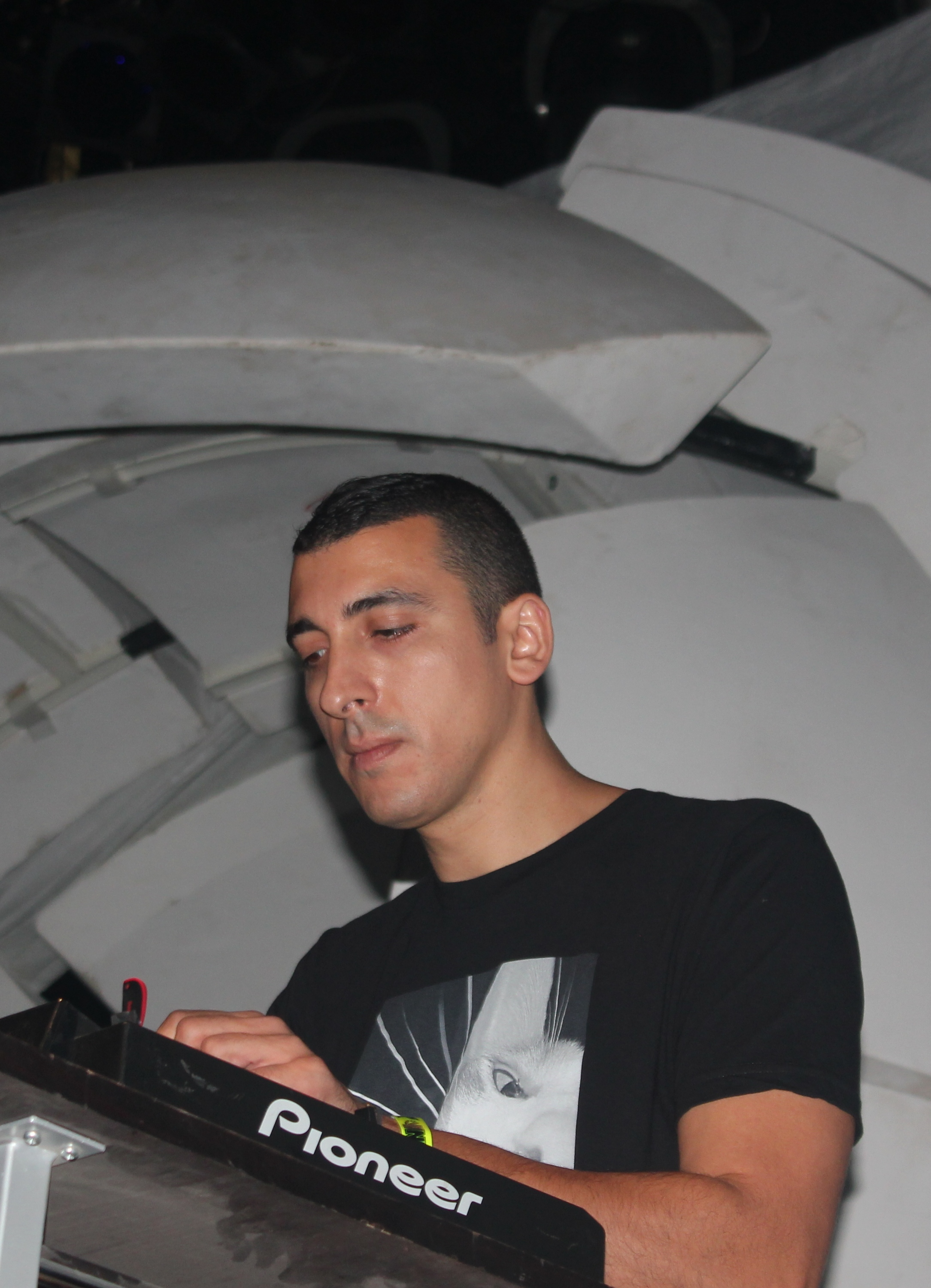 ASTRIX in Moscow 2013